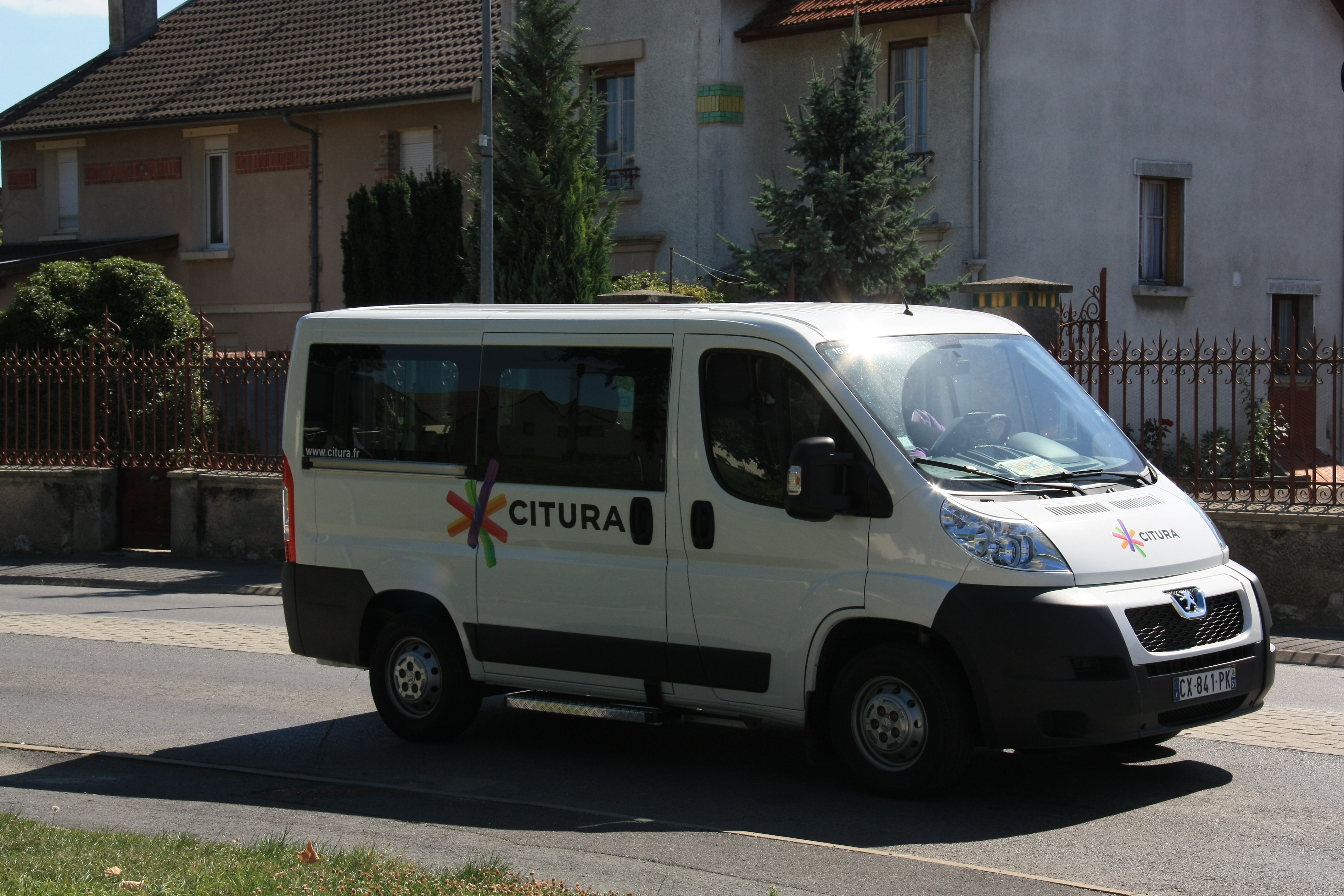 Peugeot Boxer II n°185 du réseau Citura en TAD à Sillery